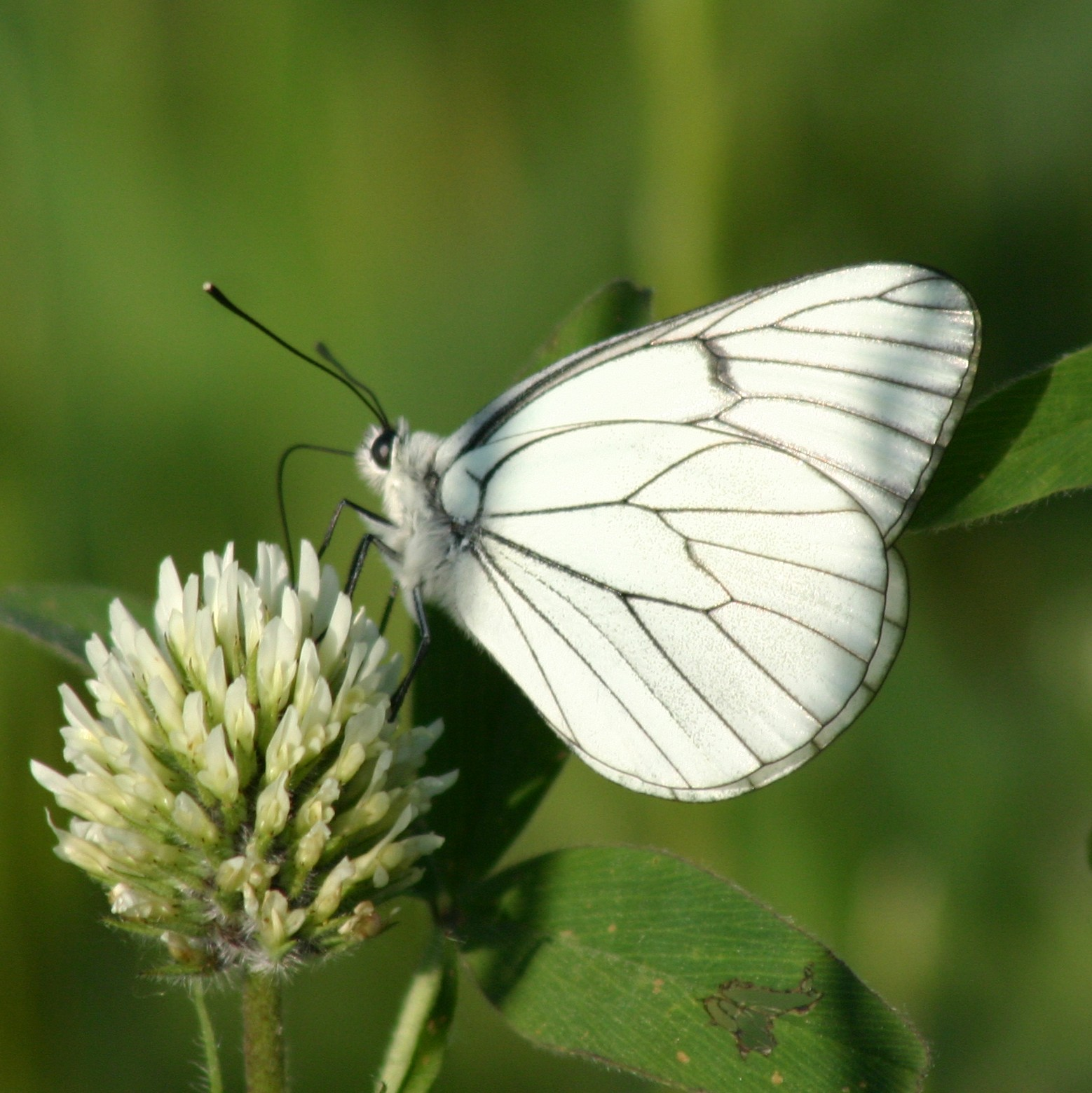 Baumweißling (Aporia crataegi), Toskana, Lucignano d'Asso (Bagnacci), 27.05.2005